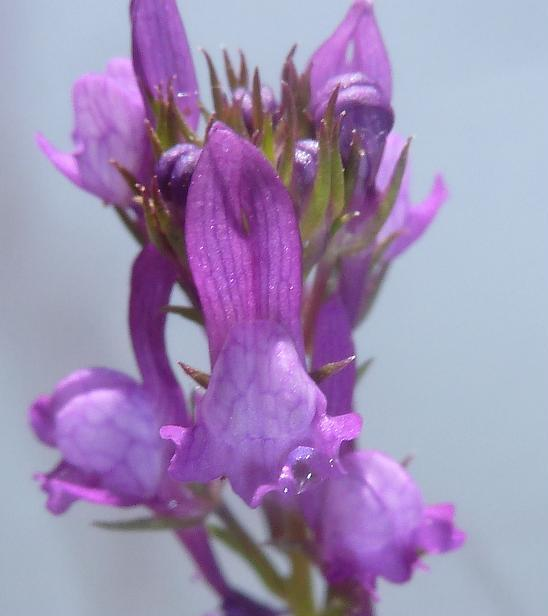 detail fleurs de la Linaire de Pelissier